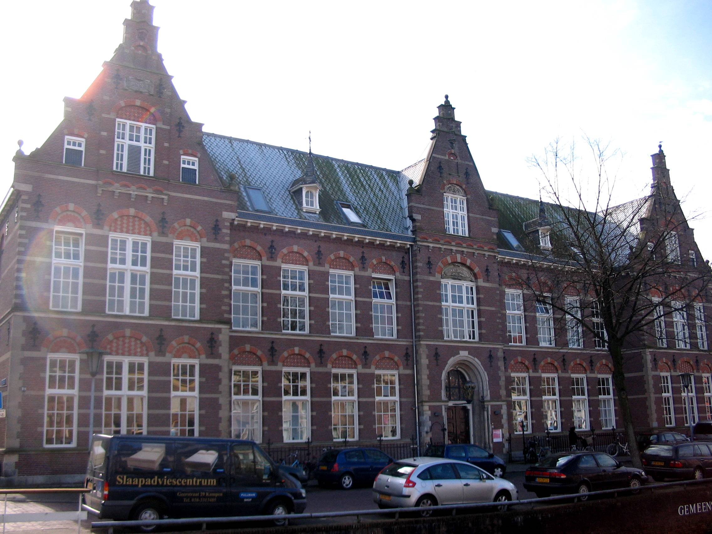 Kampen - Voormalig Burgerweeshuis aan de Vloeddijk